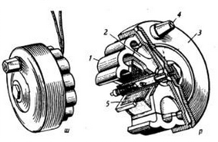 Հեռախոսայինինդուկտոր